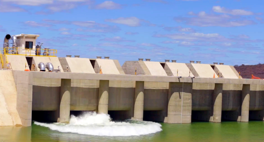 Base de bombeamento do canal da integração, em Cabrobó, Pernambuco, Brasil.